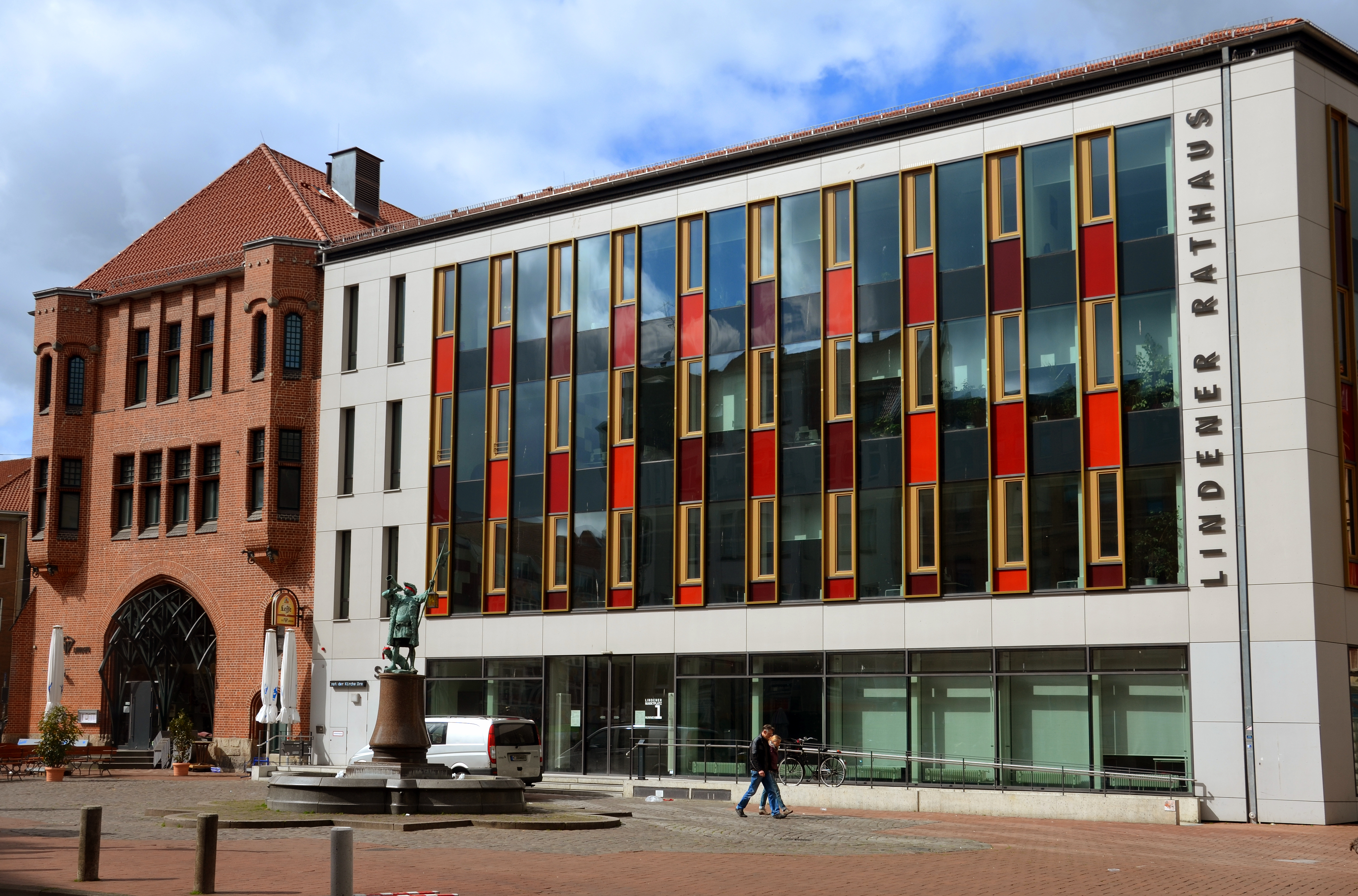 Während sich in Hannover am Tag der Arbeit am Erster Mai 2015 eine großer Demonstrationszug unter Führung der Gewerkschaften und anderer sozialer Organisationen vom traditionellen Versammlungsort Freizeitheim Linden zum neu gestalteten Trammplatz vor dem Neuen Rathaus bewegte, entstand - mit dem Fahrrad schnell noch mal eben eine Schleife gedreht - dieses Foto des neu gestalteten Neuen Lindener Rathauses. An diesem Vormittag war der Lindener Marktplatz relativ menschenleer, lediglich ein Lieferwagen zur Vorbereitung der 900-Jahr-Feierlichkeiten der ehemaligen Industriestadt Linden verstellte die freie Sicht auf die neu gestaltete Fassade des Lindener Rathauses, in dem sich der Vormittags-Himmel spiegelte. Vor dem Hochladen in die globale Medien-Datenbank Wikimedia Commons wurde das so entstandene Foto mit dem kostenlos herunterladbaren Bildbearbeitungs-Programm GIMP geometrisch entzerrt ...